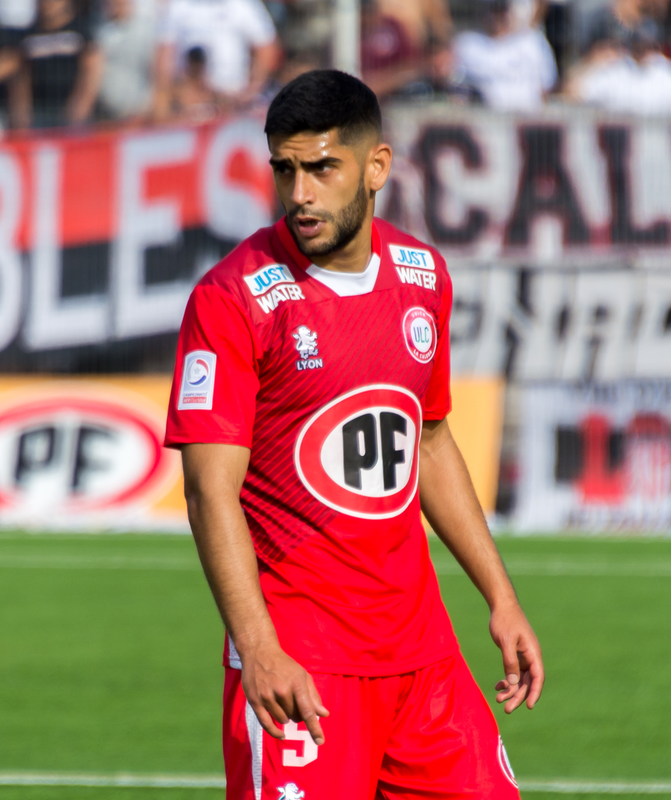 Matías Laba, Unión La Calera v Colo-Colo, Estadio Municipal Nicolás Chahúan Nazar, La Calera, Región de Valparaíso, Chile.